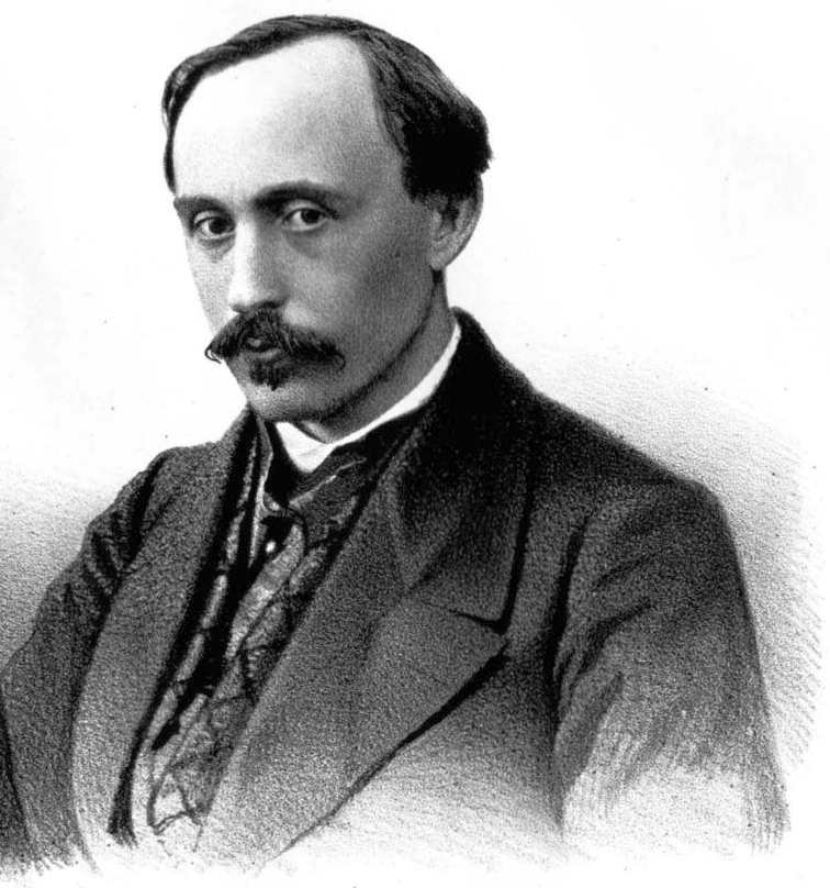 Соколов, Иван Иванович (живописец)